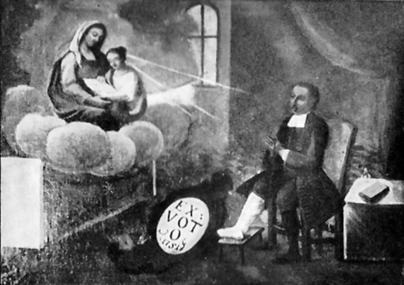 Church St. Anna, München - Harlaching. Dieses Votivbild zeigt oben links das Motiv der Anna, die Maria im Lesen der Bibel unterrichtet, wie es auf dem Altarbild des rechten Seitenaltars dargestellt ist, was als Indiz dafür gilt, dass dieses Altarbild im 18. Jahrhundert das Gnadenbild der Kirche war.